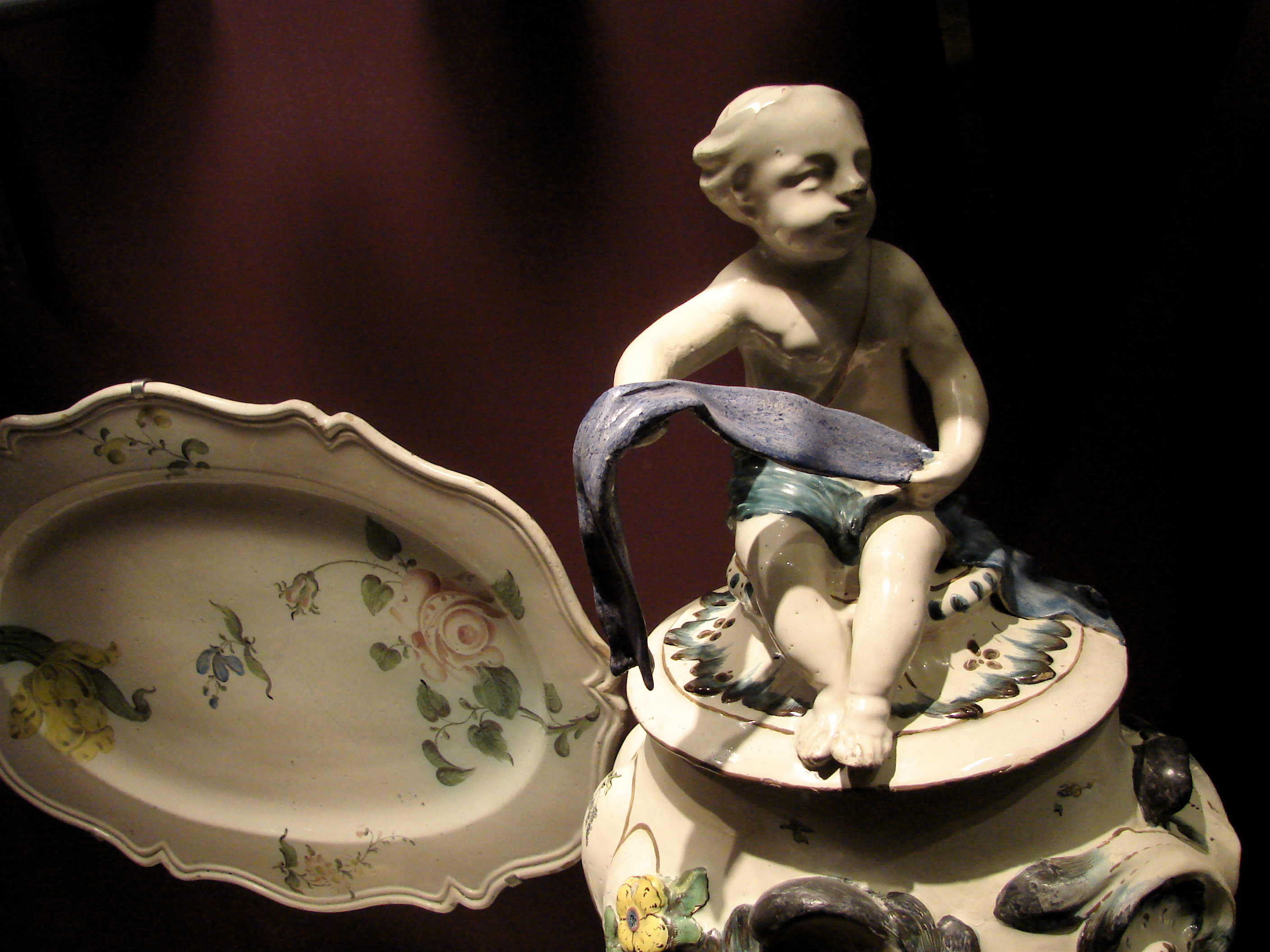 Fajance i form af en potpourrivase og et fad med haveblomster, fra Kastrupfabrikken på Amager omkring 1760, Nationalmuséet i København